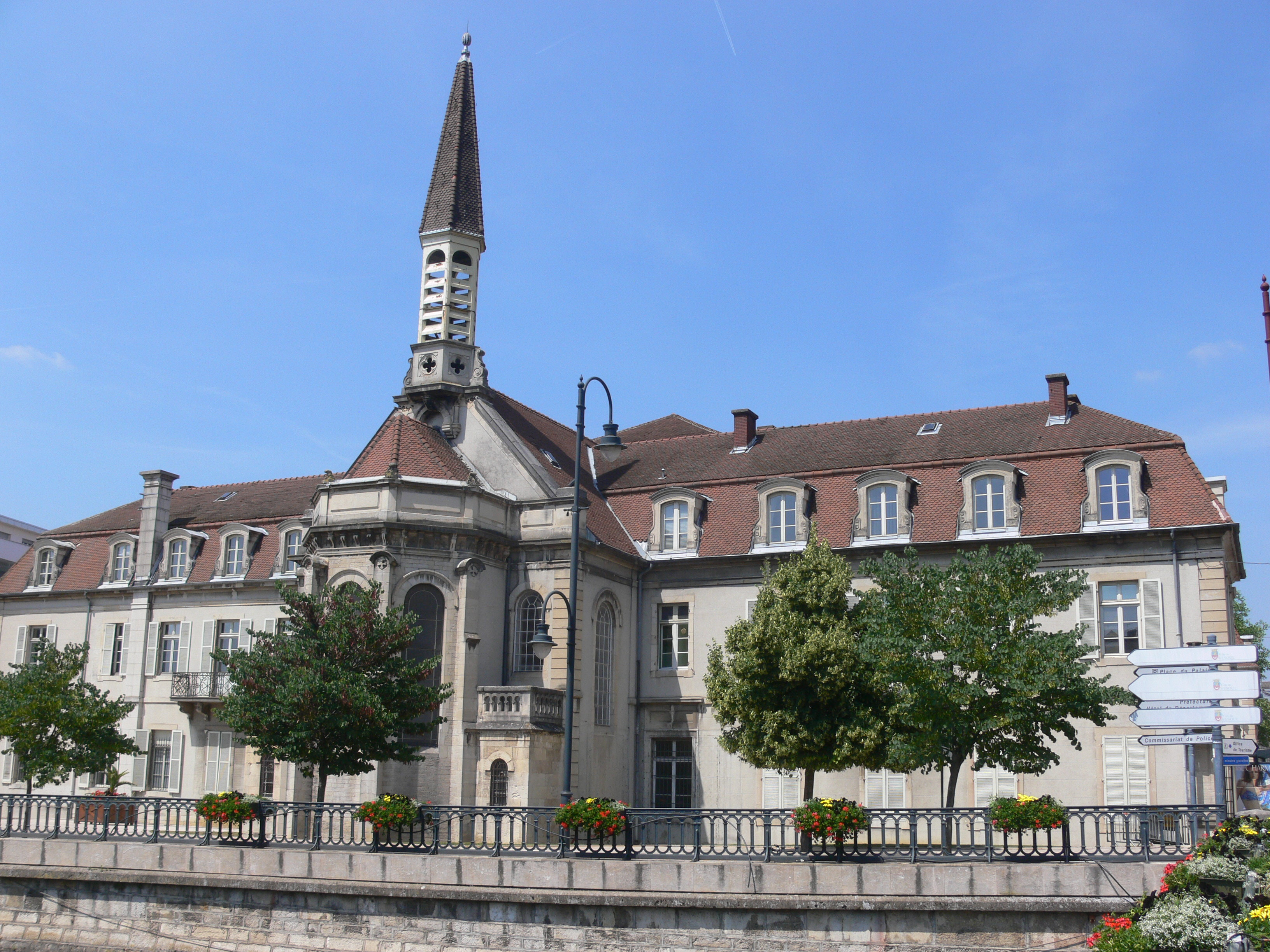 Hôtel de ville de Vesoul (ancien hôpital), vu depuis le pont du Durgeon